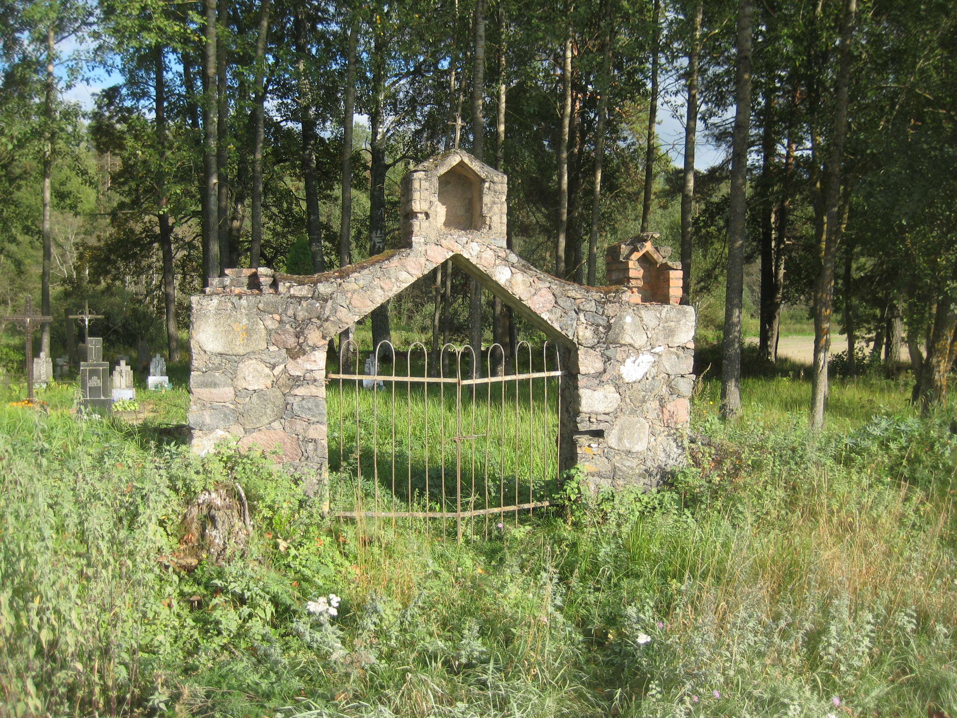 Kamajų sen., Lithuania